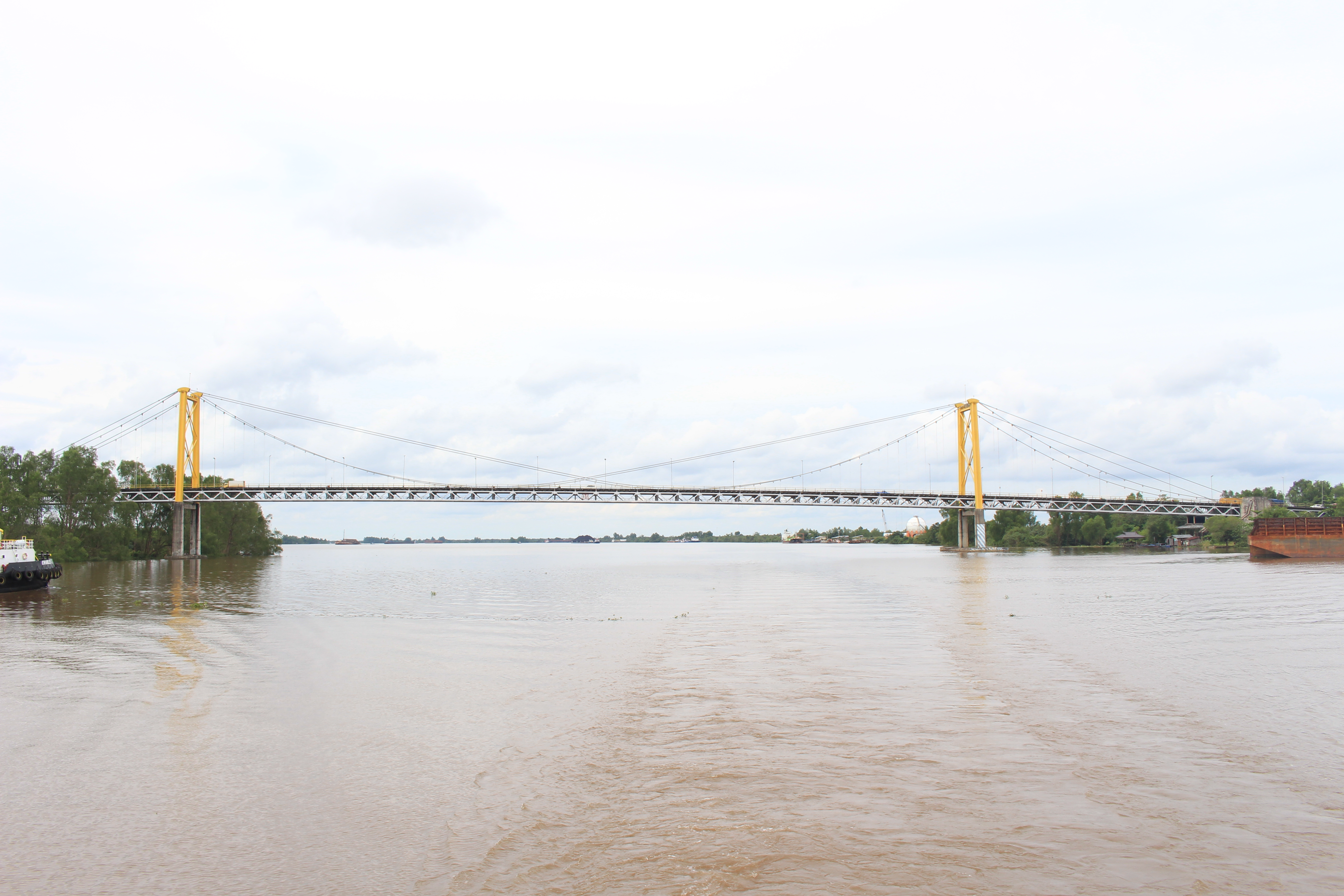 Jembatan Barito di sungai Barito, Banjarmasin, Kalimantan Selatan, Indonesia.